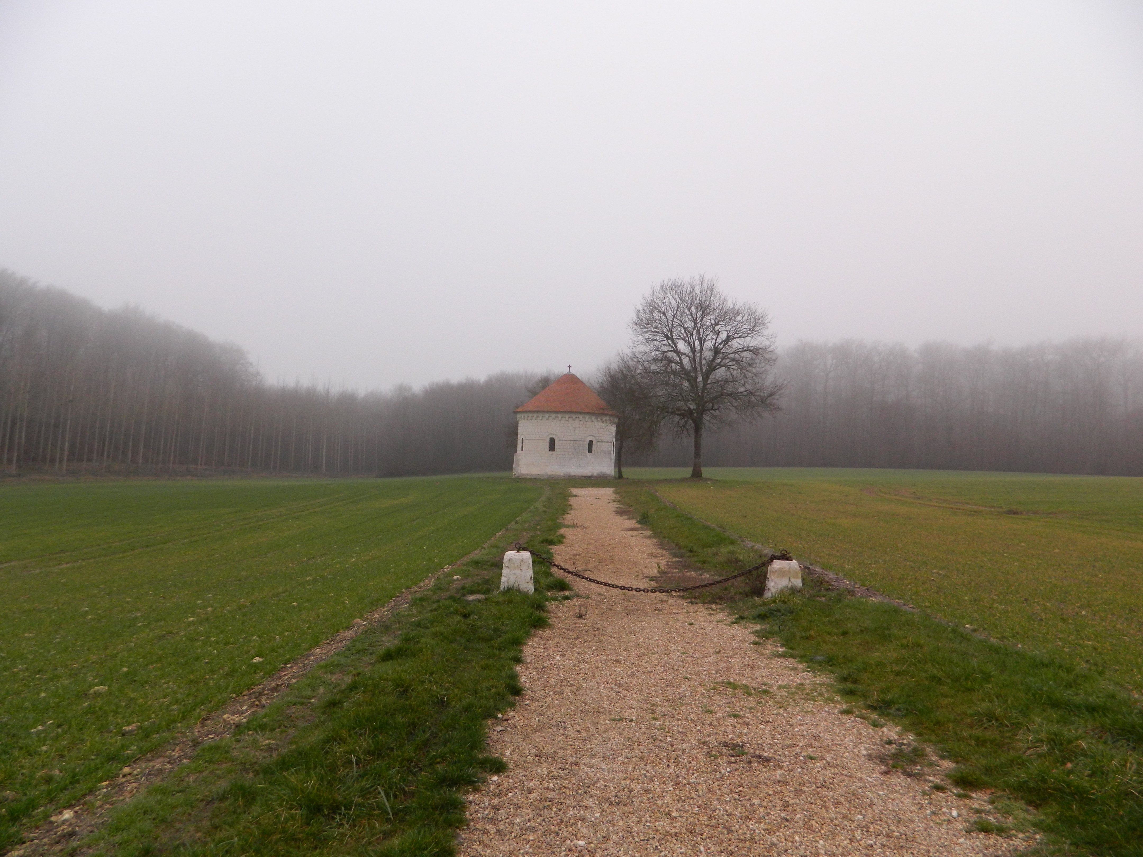 Chapelle Saint-Jean-du-Liget, à Sennévières, dans la brume hivernale